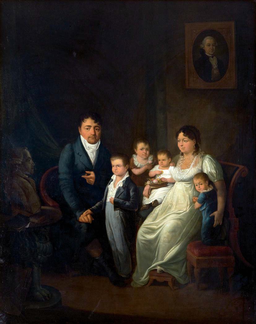 Egidius Mengelberg, Peter und Elisabeth de Weerth mit Friedrich August (1804–1879), Ernst Eugen (1807–1869), Emilie Elisabeth (1810–1847) und Werner (1809–1859), 1812, Privatbesitz